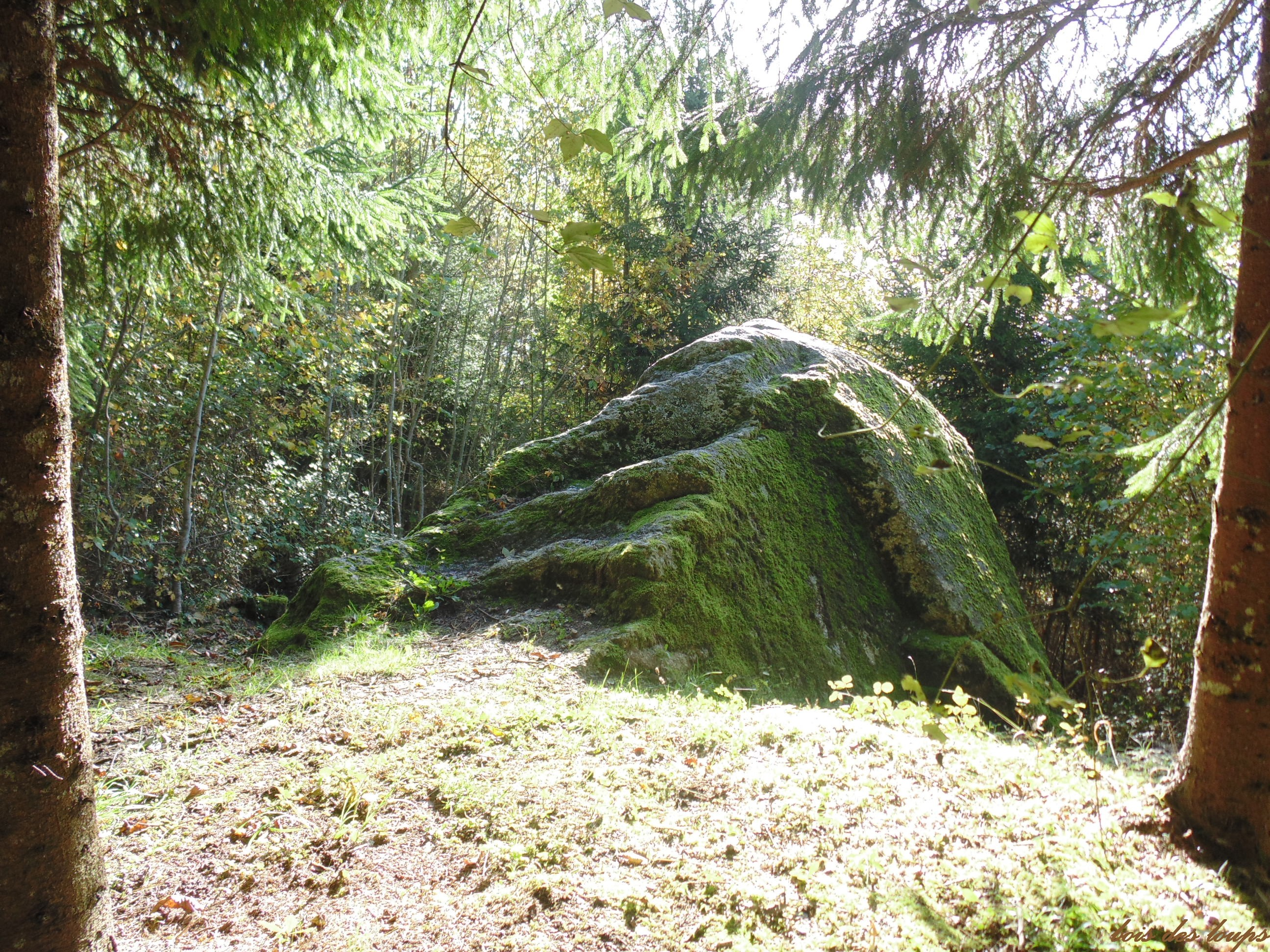 Bloc erratique de la commune de Lucinges qui porte le nom de son propriétaire. Il est aussi nommé bloc de la Follieuse du nom du nant voisin. Ce bloc a été acheté à la fin du XIX siècle par Henri de Saussure, naturaliste genevois, petit fils d'Honorace Benedict de Saussure (ethnographe et premier explorateur du massif du Mont Blanc). Ces blocs erratiques jalonnaient abondamment la vallée et servaient de carrière pour toute la région genevoise. Sciés en morceaux les uns après les autres, ils sont devenus rares et c'est pour en concerver un specimen que celui-ci a été donné au club alpin genevois.